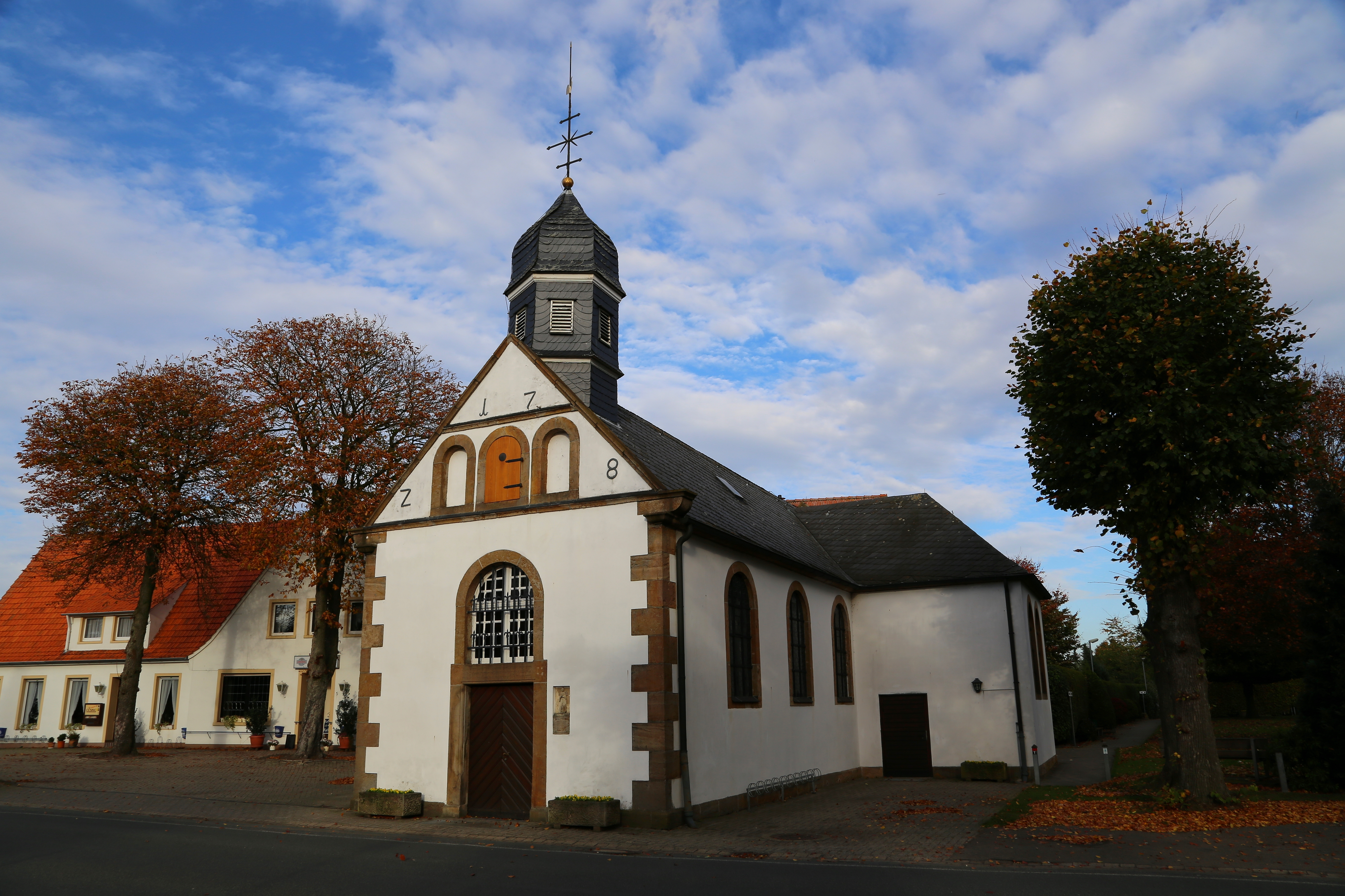 Rückwärtige Ansicht der Wallfahrtskapelle St. Anna in Hopsten-Breischen, Kreis Steinfurt, Nordrhein-Westfalen, Deutschland. This is a photograph of an architectural monument.